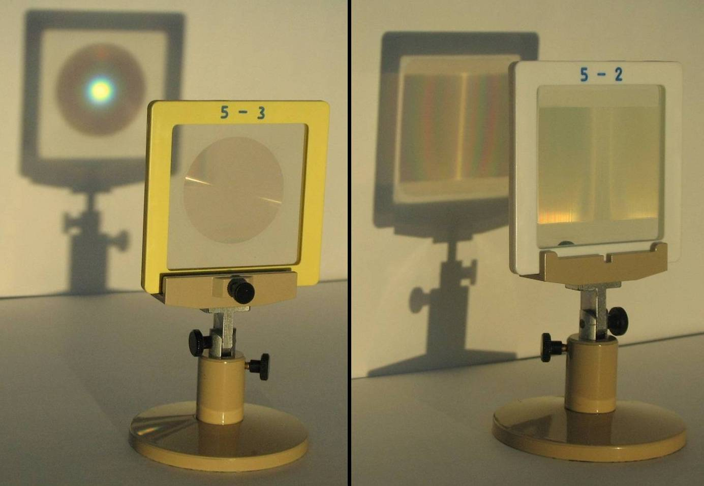 Демонстрація дії дифракційних сферичної та циліндричної лінз за допрмогою навчального приладу ЕСФЕ-1 "Оптика" виробництва ТОВ "Ніжинські лабораторії скануючих пристроїв". Nizh Labs of Scannig - 45